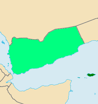 شطري اليمن الآسيوي والأفريقي